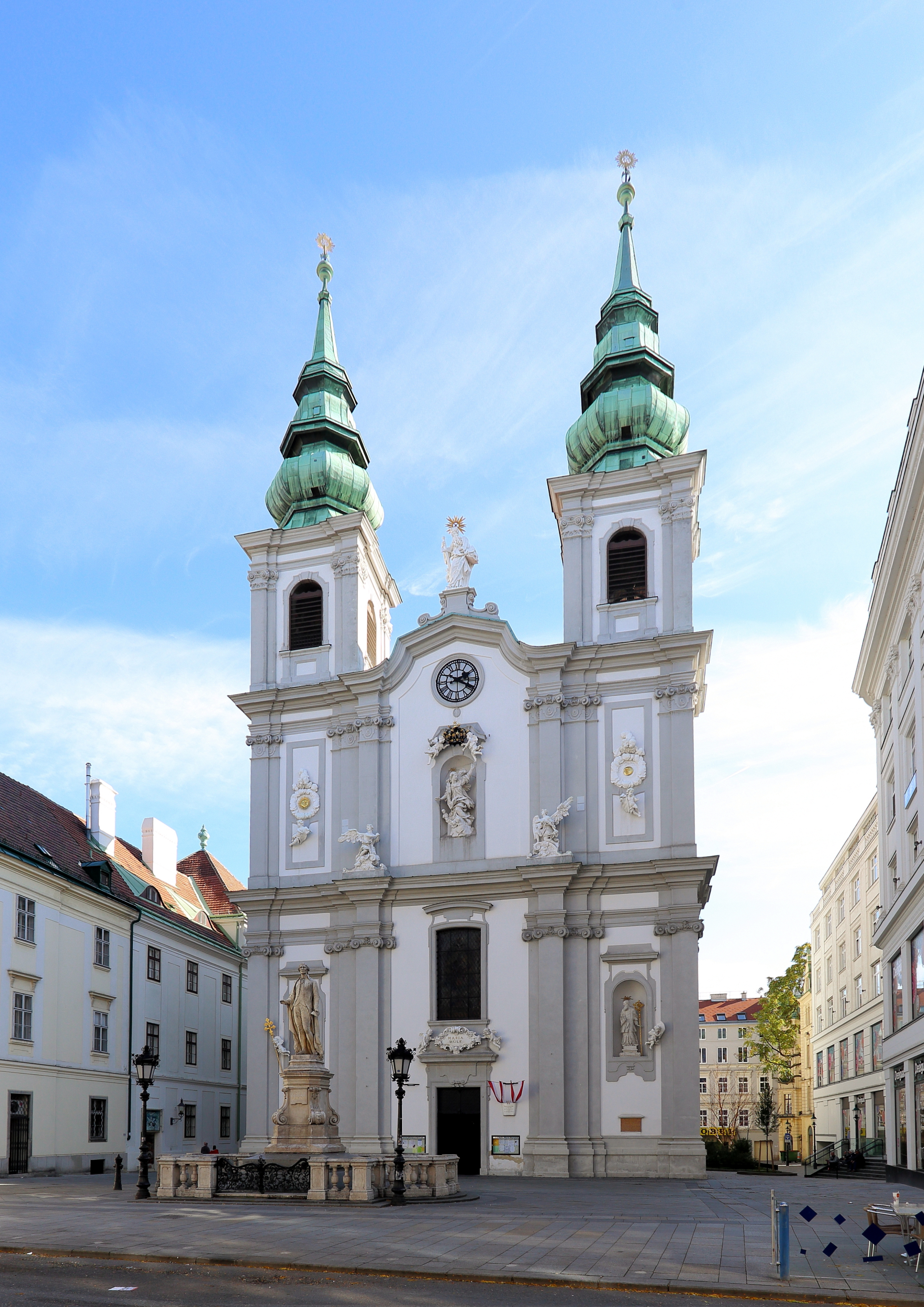 Die römisch-katholische Pfarrkirche Maria Hilf in Mariahilf, ein Stadtteil der österreichischen Bundeshauptstadt Wien.